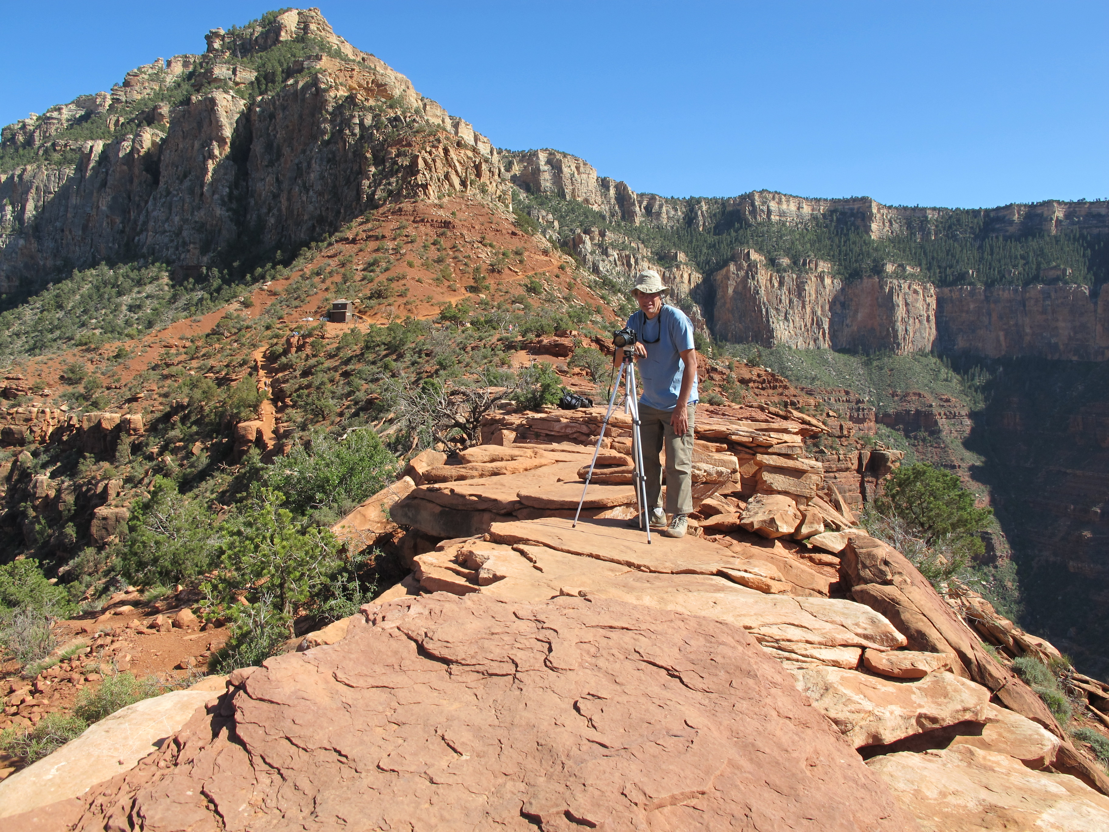 Marcos Couch realizando una toma en El Cañon del Colorado